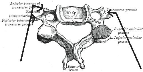 Módosítva